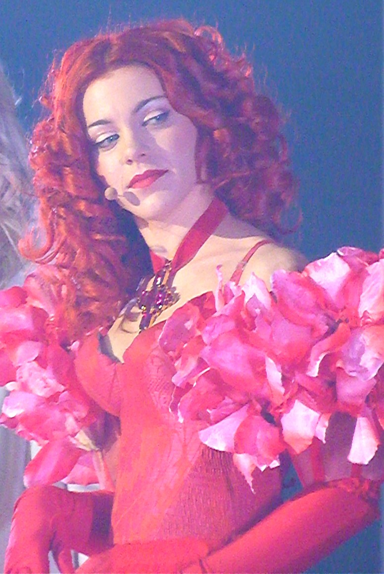 Anaïs Delva durant une représentation de "Dracula, l'amour plus fort que la mort"